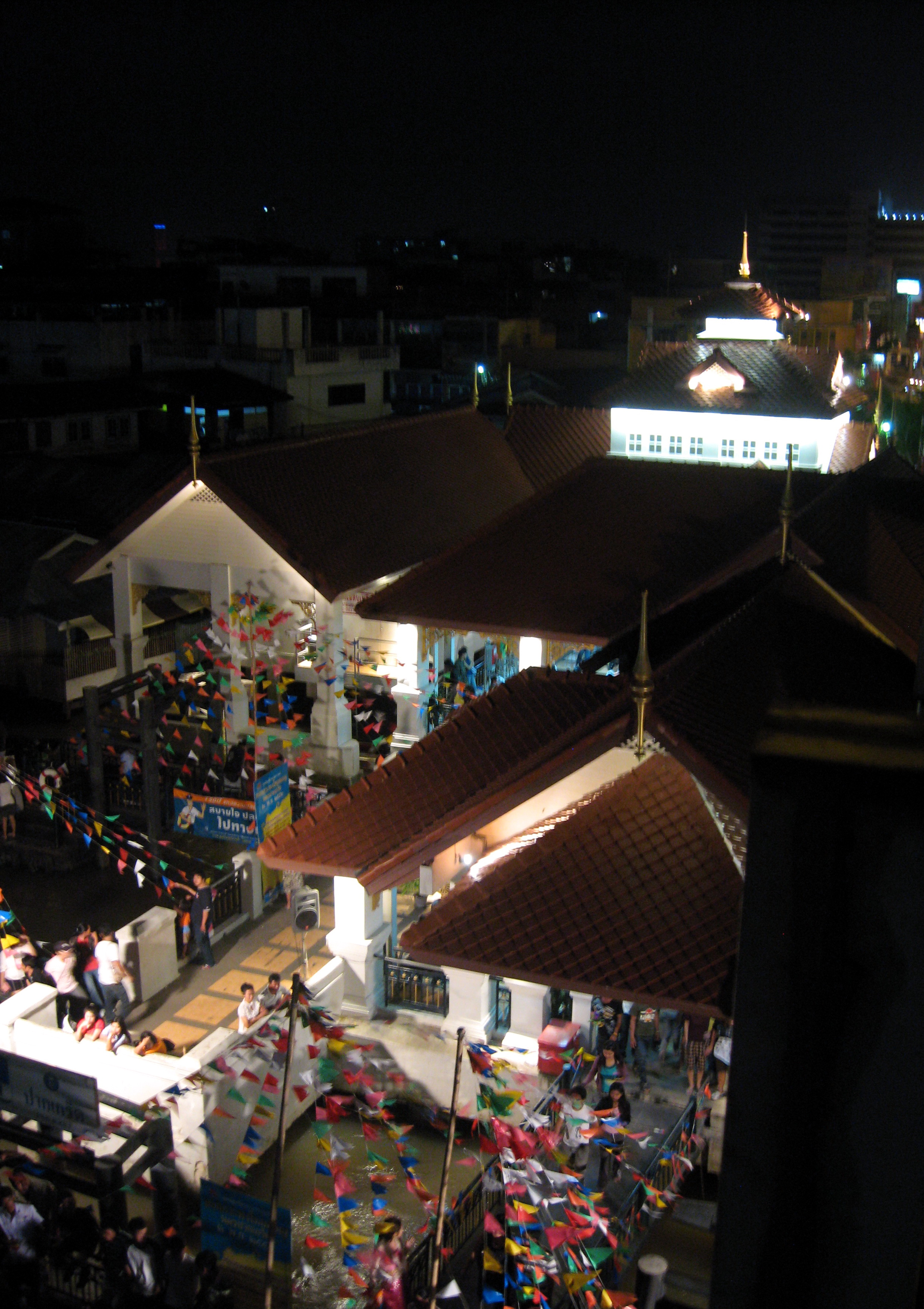 Pak Kret Pier2